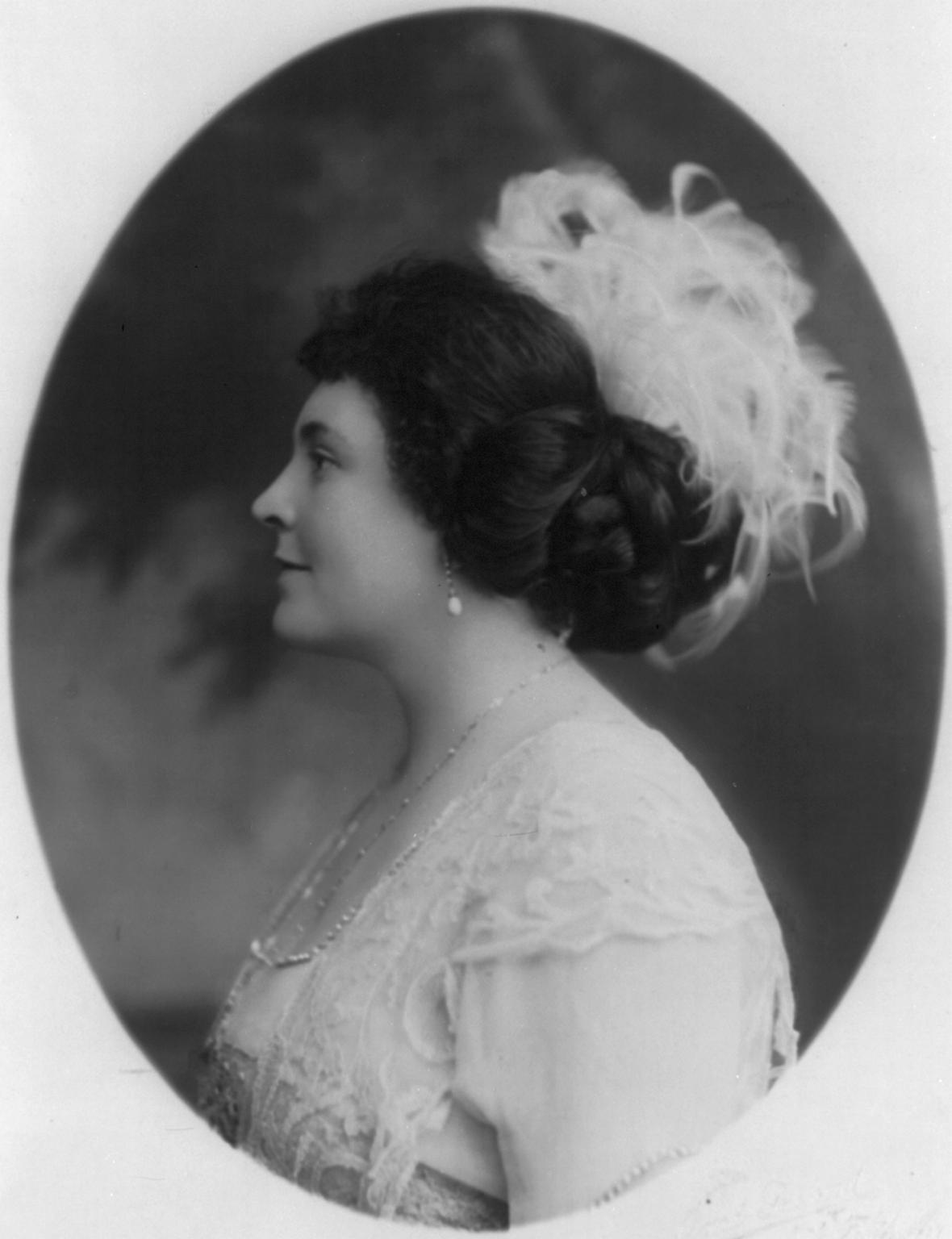 Paula Blackton